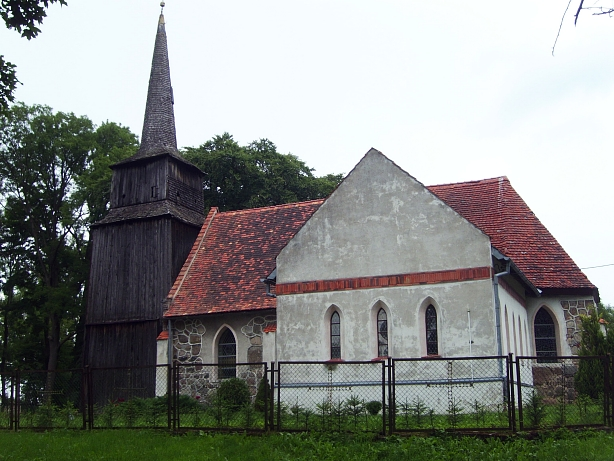 Brojce - rzymskokatolicki kościół parafialny NSPJ, XV, 1909; wieża 1619